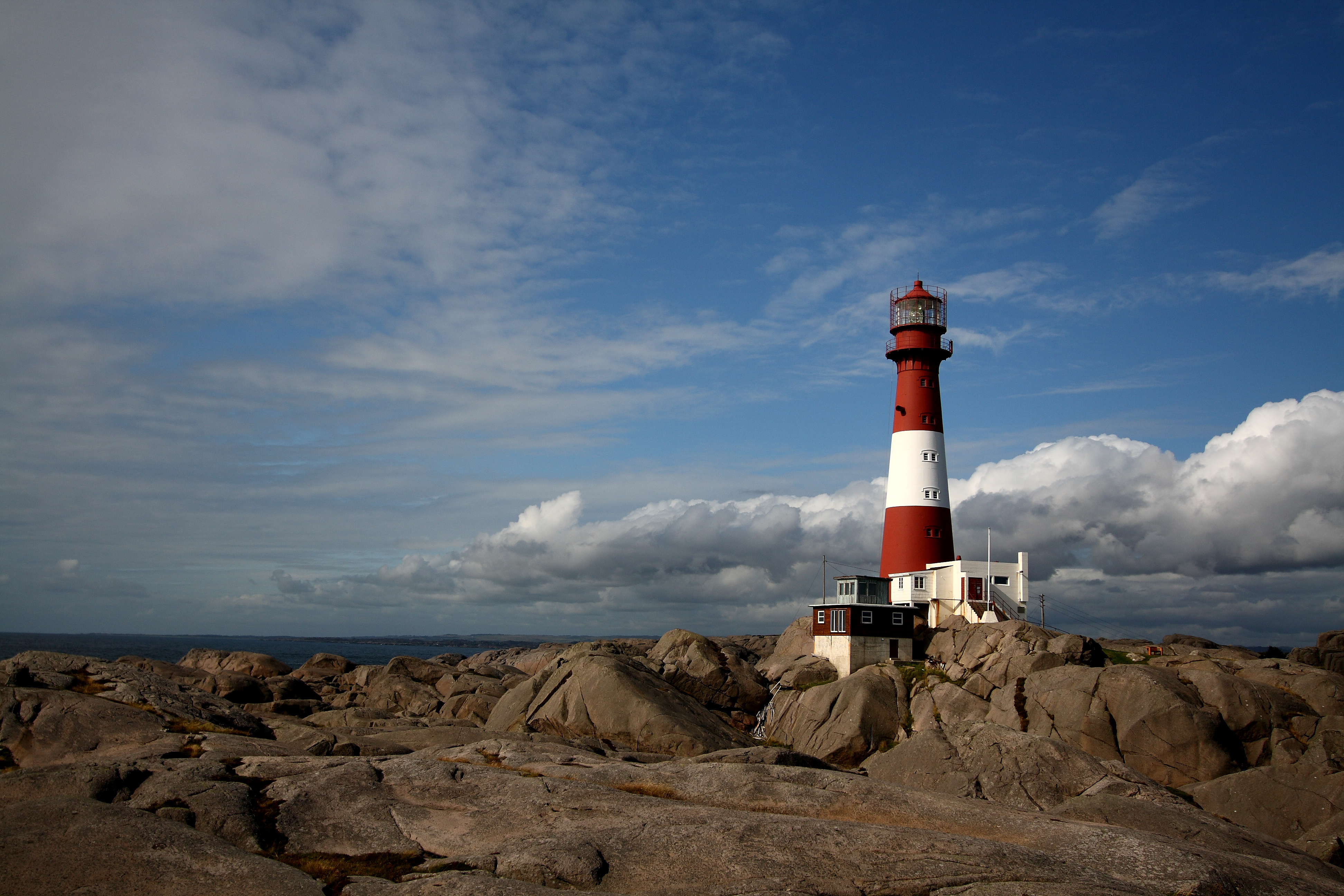 Eigerøy lighthouse